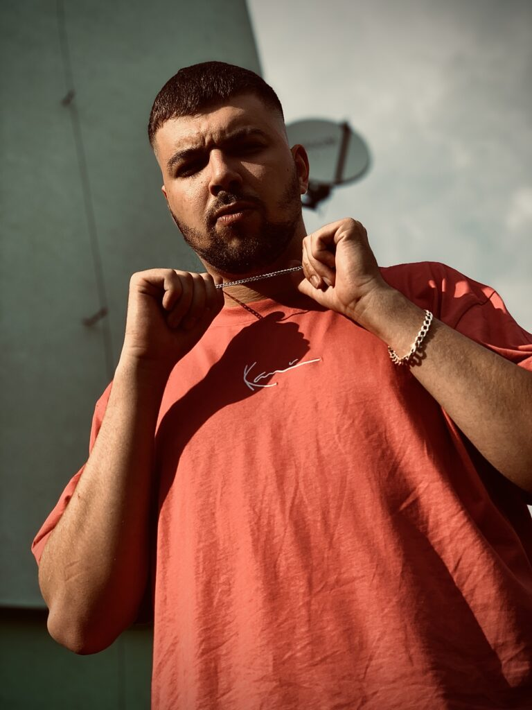 Behype / DJ Behype